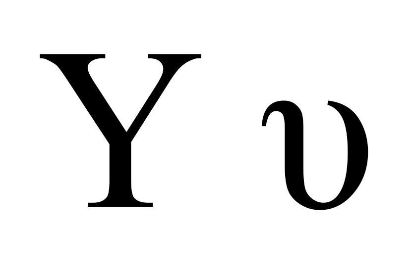 greek letter upsilon